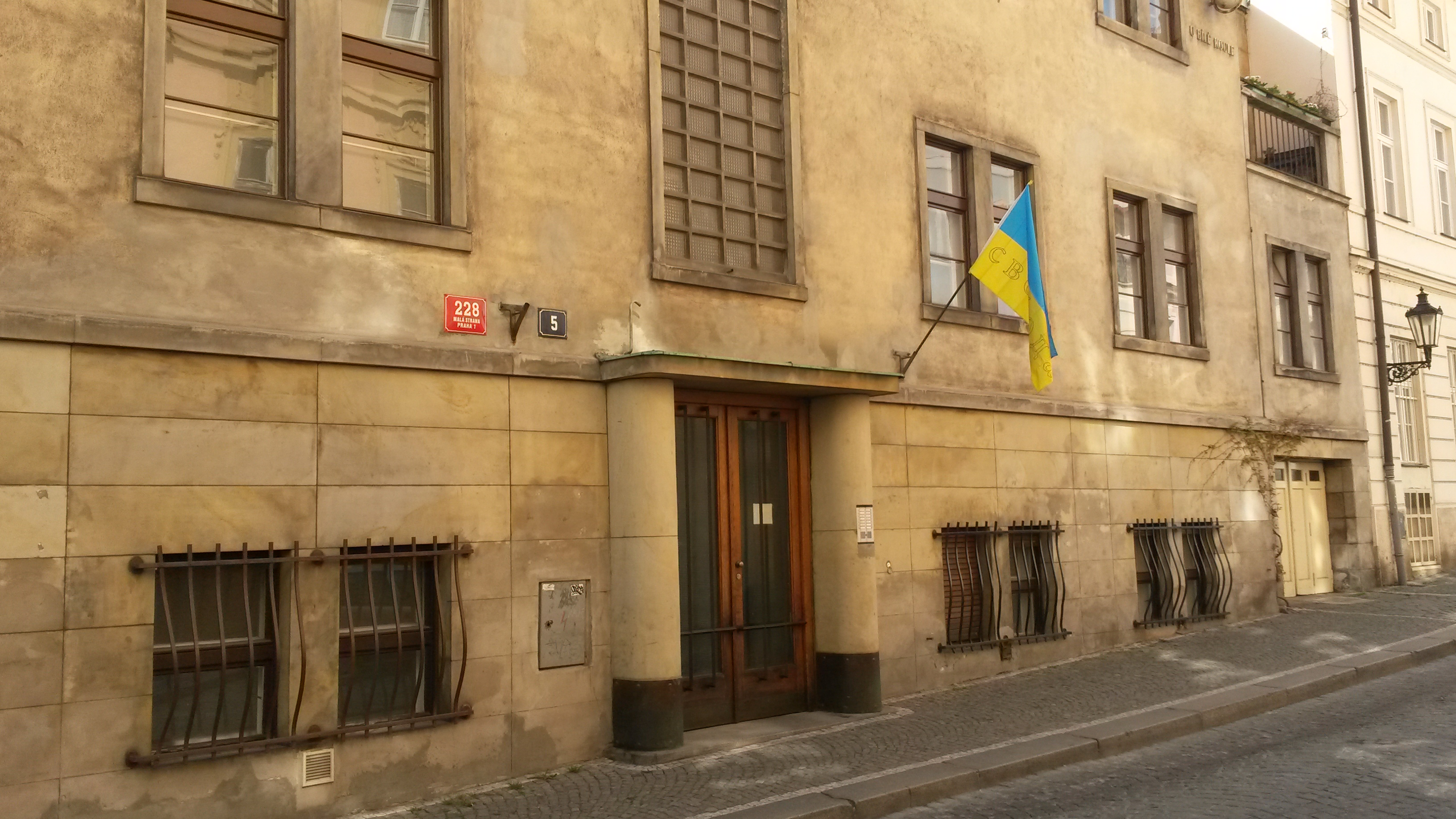 Ukrajinska vlajka na jednom z prazskych domu behem nepokoju v roce 2014